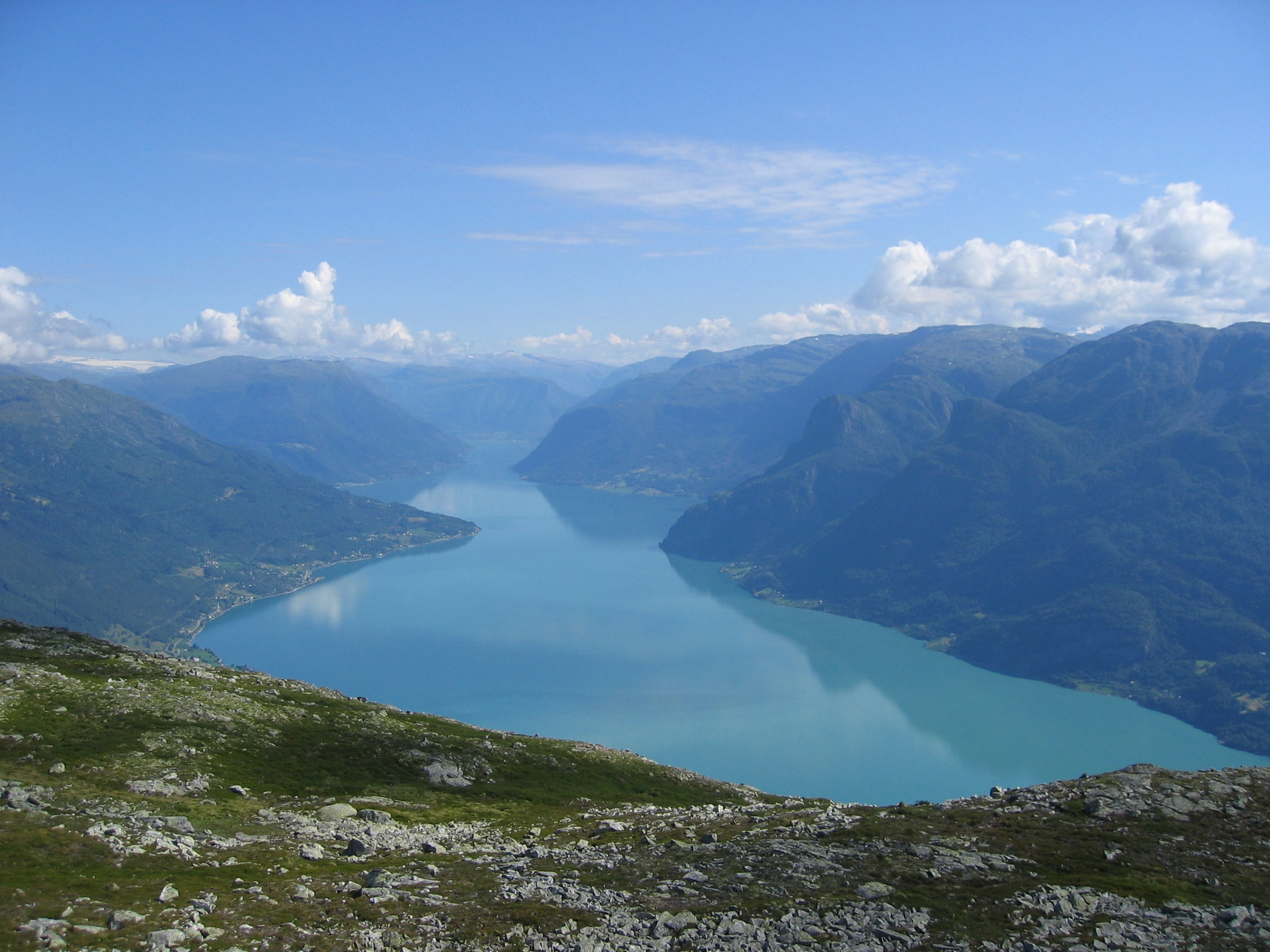 Lustrafjorden